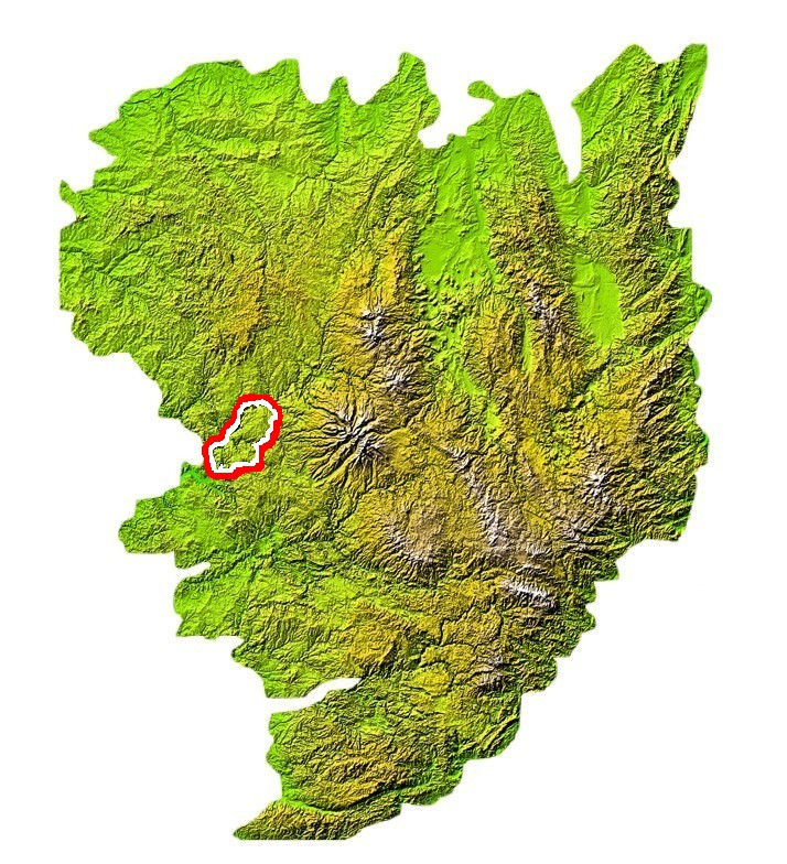 Situation de la Xaintrie sur la carte du Massif central